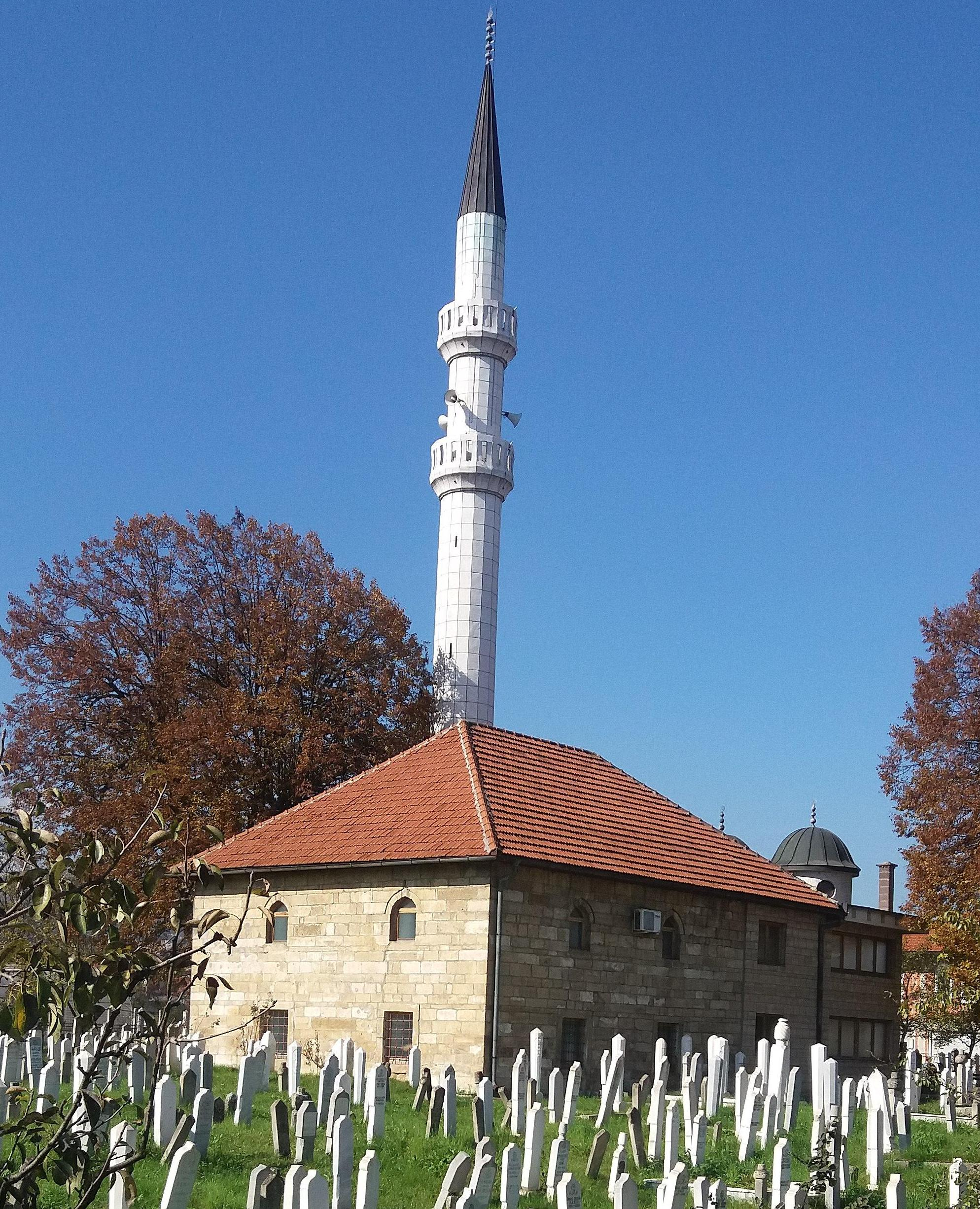 Ahmed-agina džamija u Vitezu 2016.